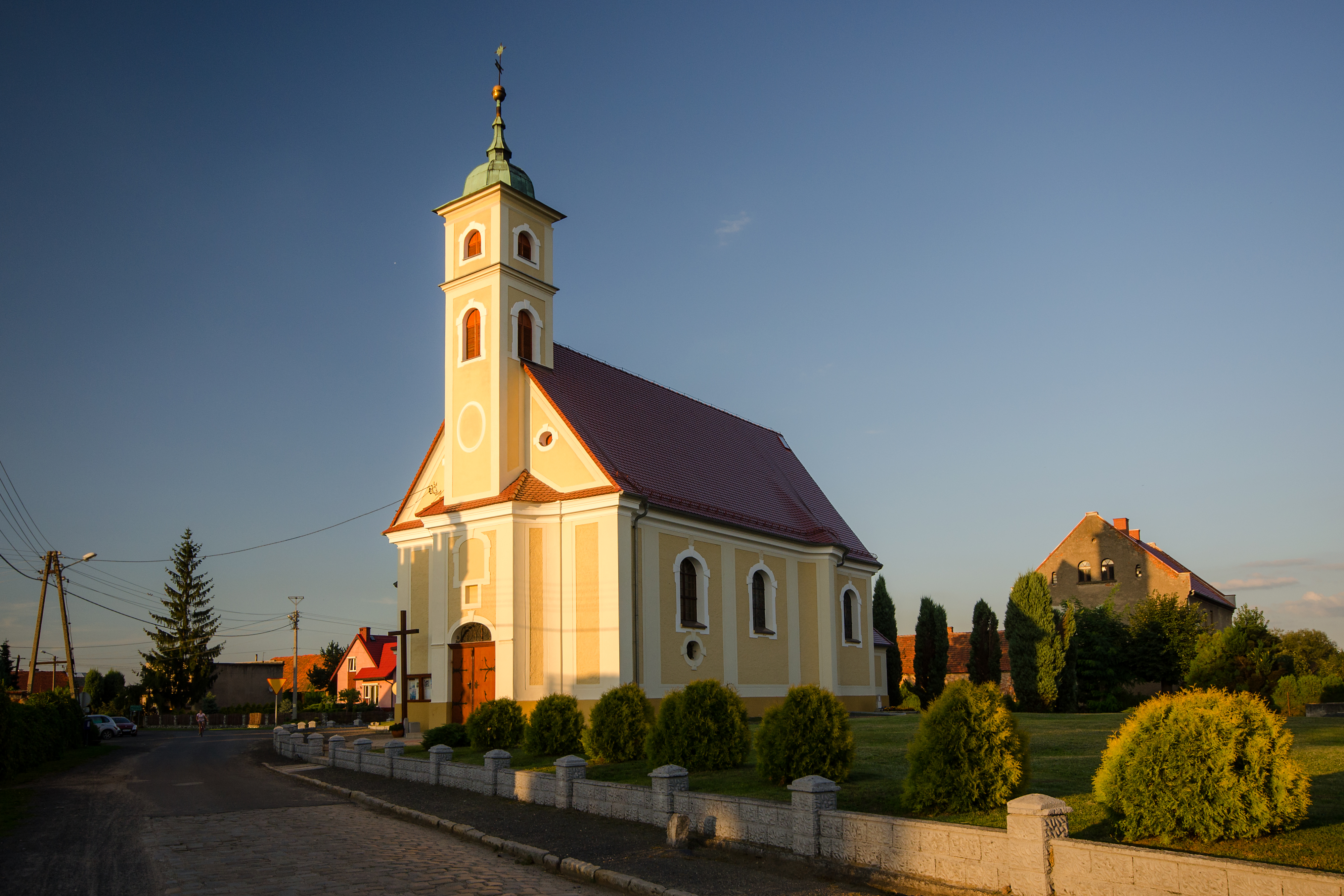 Żelazna - rzymskokatolicki kościół parafialny p.w. św. Józefa, 1781, XX